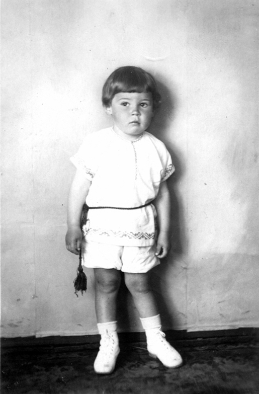 Алексей Ридигер, начало 1930-х годов